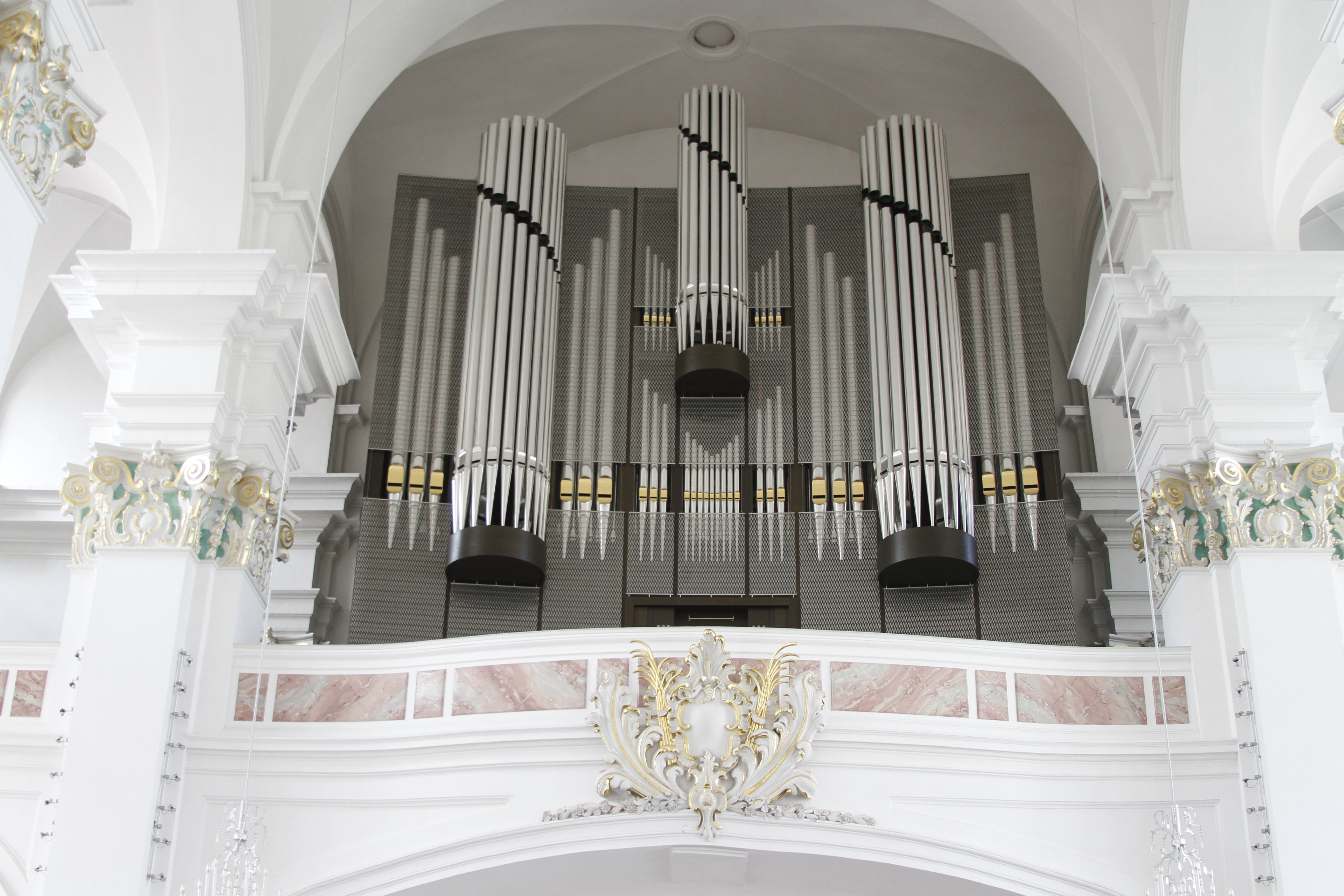 Jesuitenkirche - Heidelberg - Germany